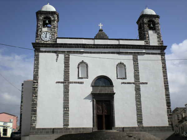 C.Mura, foto propria, Vista della Chiesa parrocchiale della Beata Vergine Assunta di Borore